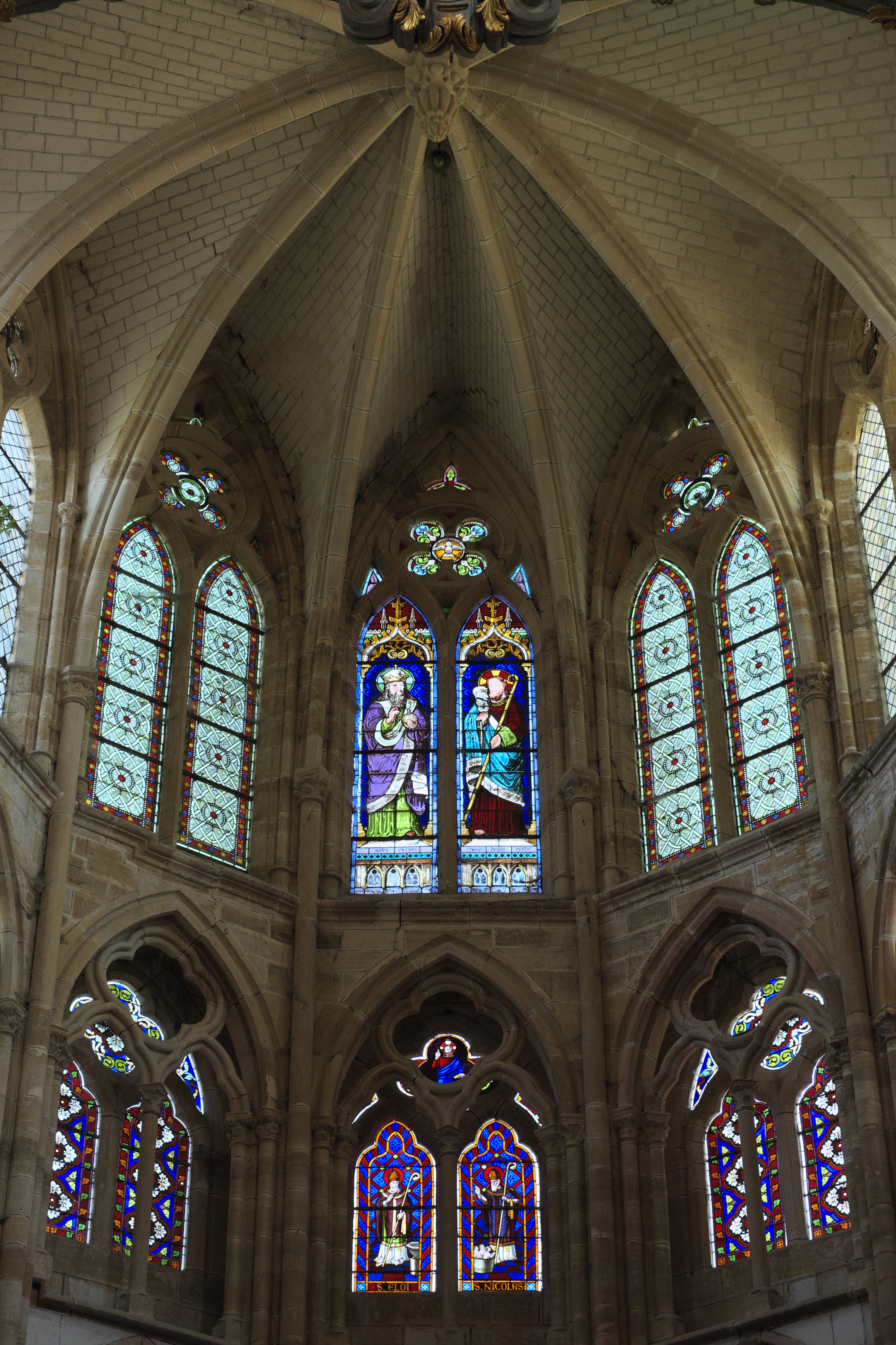 Katholische Pfarrkirche Saint-Amand in Saint-Amand-sur-Fion im Département Marne in der Region Grand Est/Frankreich, Chor